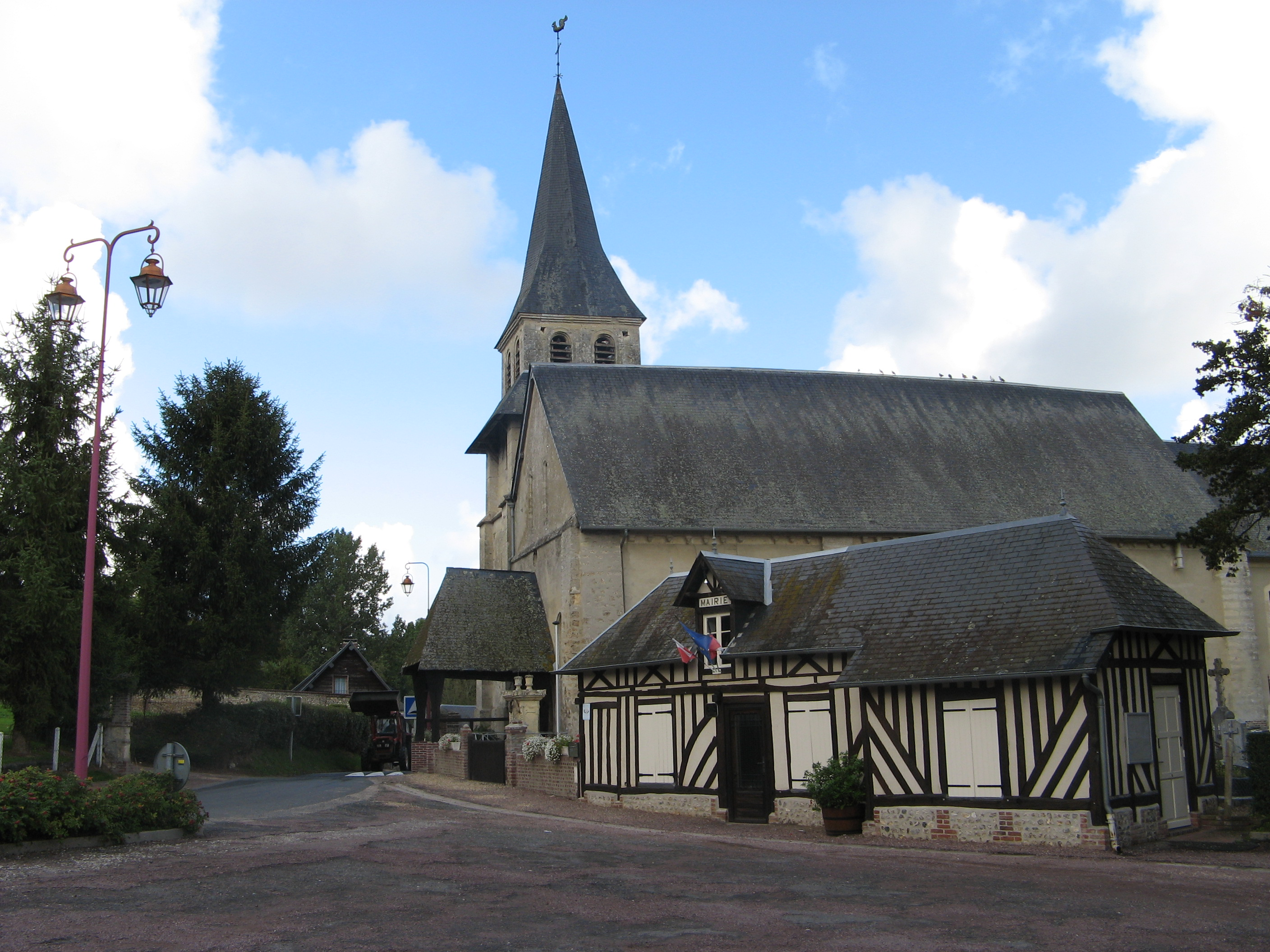 La mairie (premier plan) et l'église de Clarbec.